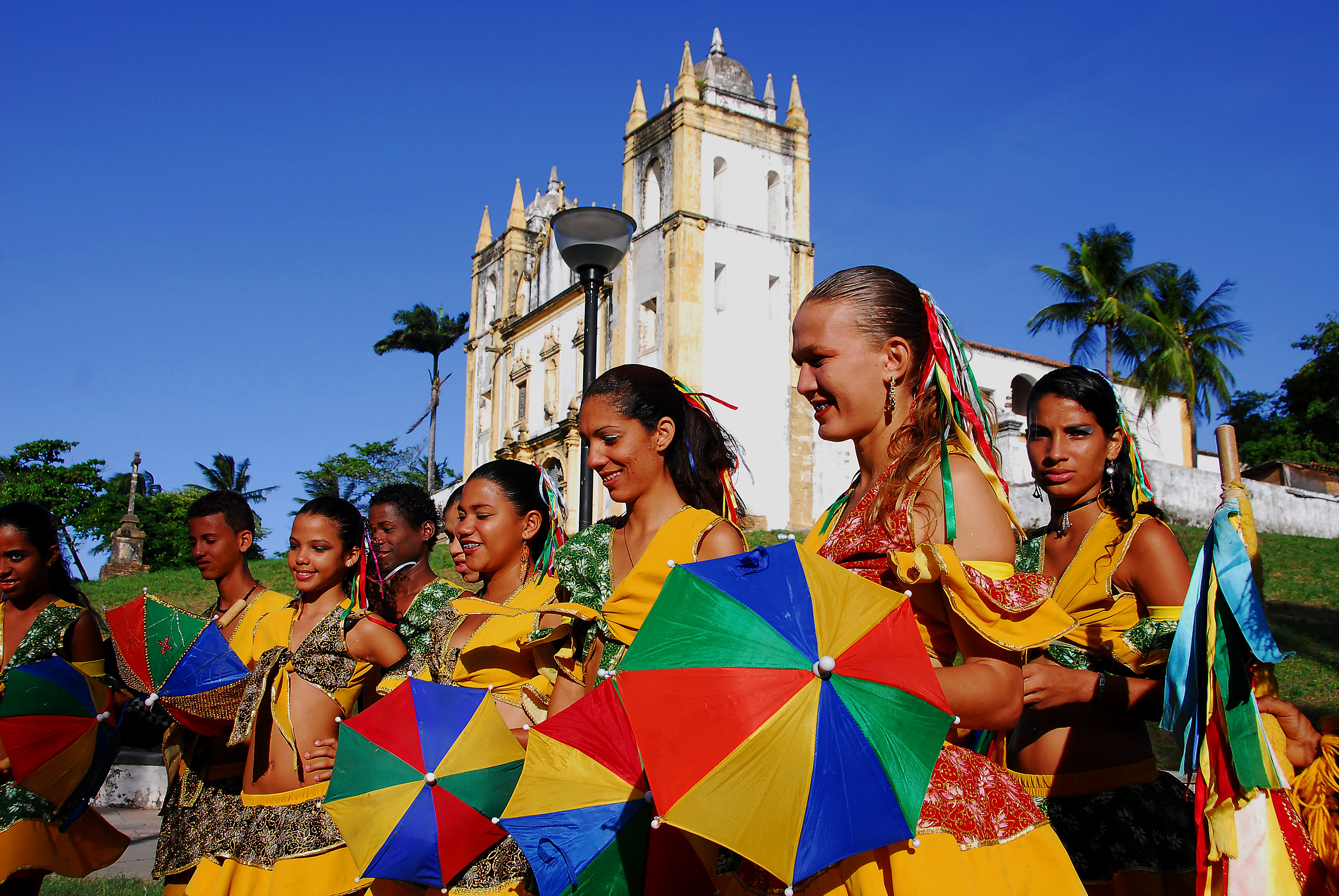 Embora nascido no Recife, é em Olinda que o frevo tem hoje a sua maior expressão. Todo ano, cerca de um milhão de pessoas vindas de todo o mundo lotam as ruas e ladeiras do Sítio Histórico da cidade em busca da efervescência e da alegria da festa. Uma folia alimentada por cerca de 500 agremiações carnavalescas locais e de outros municípios pernambucanos, que tornam o Carnaval olindense inesquecível e imperdível. Foto: Passarinho/Pref.Olinda